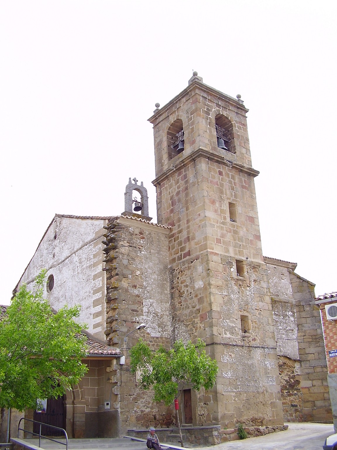 Iglesia de Villa del Campo (provincia de Cáceres, España)